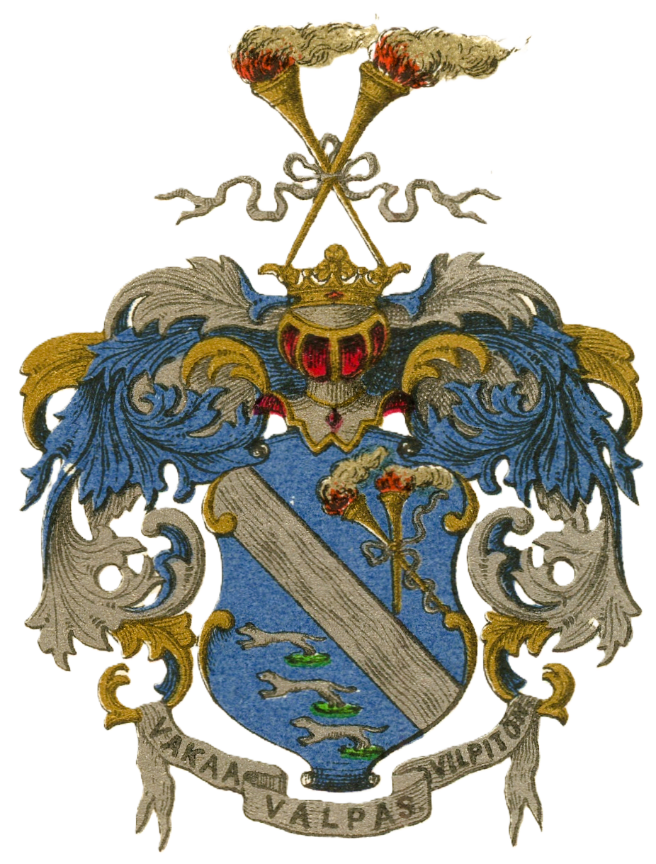 Vaakuna